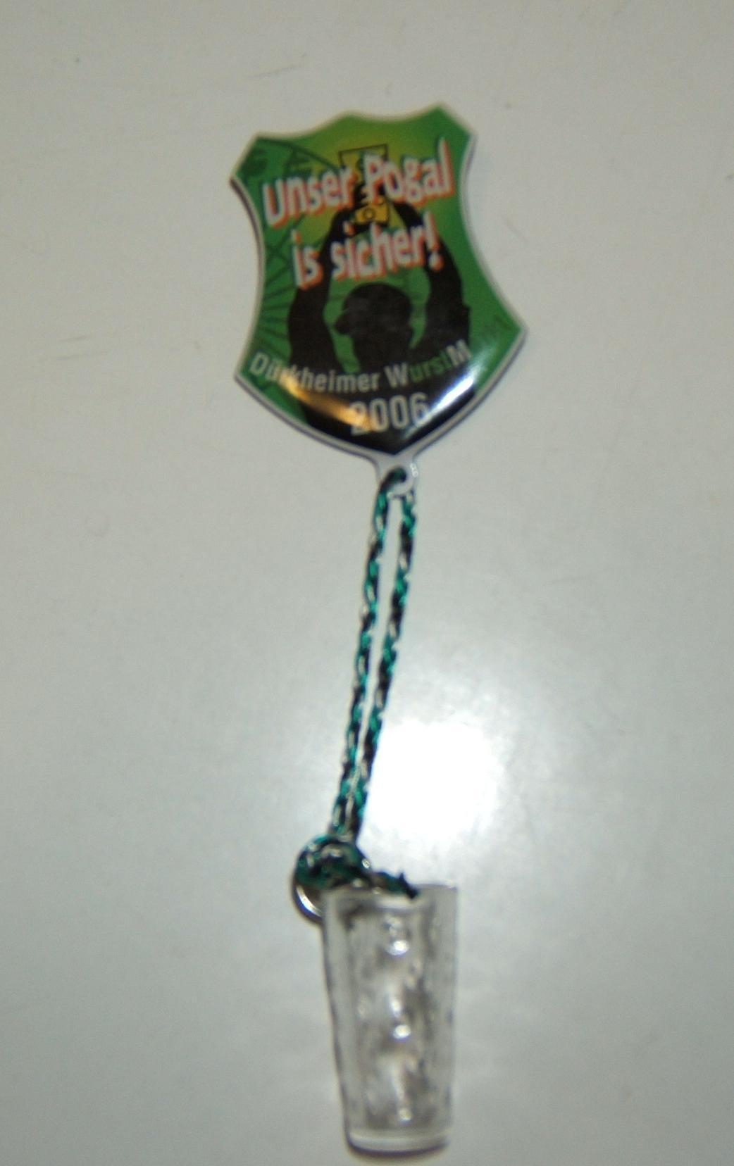 Dubbeglasorden vom Wurstmarkt in DÜW, 2006